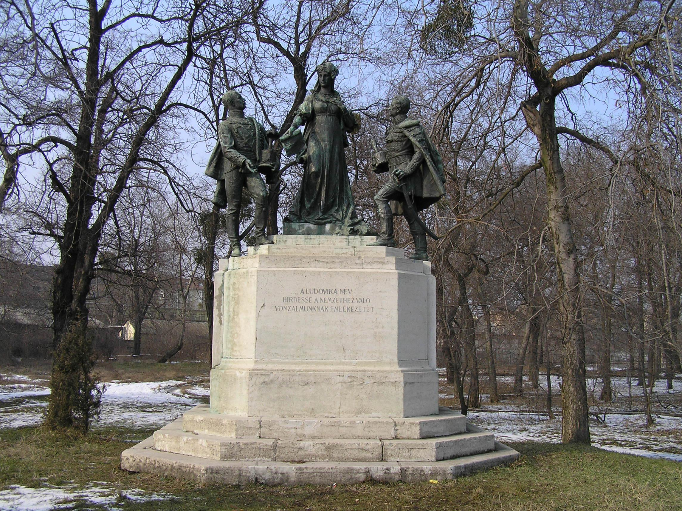 Ludovikás szobor a Ludovika mögött, az Orczy-kertben (Budapest, VIII. kerület). Felirata: "A Ludovika név hirdesse a nemzethez való vonzalmunknak emlékezetét." - A szoborcsoport Mária Ludovika királynét, József nádort és Buttler János grófot örökíti meg. Bassler Adolf alkotása (1901) Az 1919-ben ledöntött és megrongált szoborcsoportot Vass Viktor (1873–1955) rekonstruálta (1929). A második világháború után eltávolított szobrot 1992-ben avatták ismét fel.